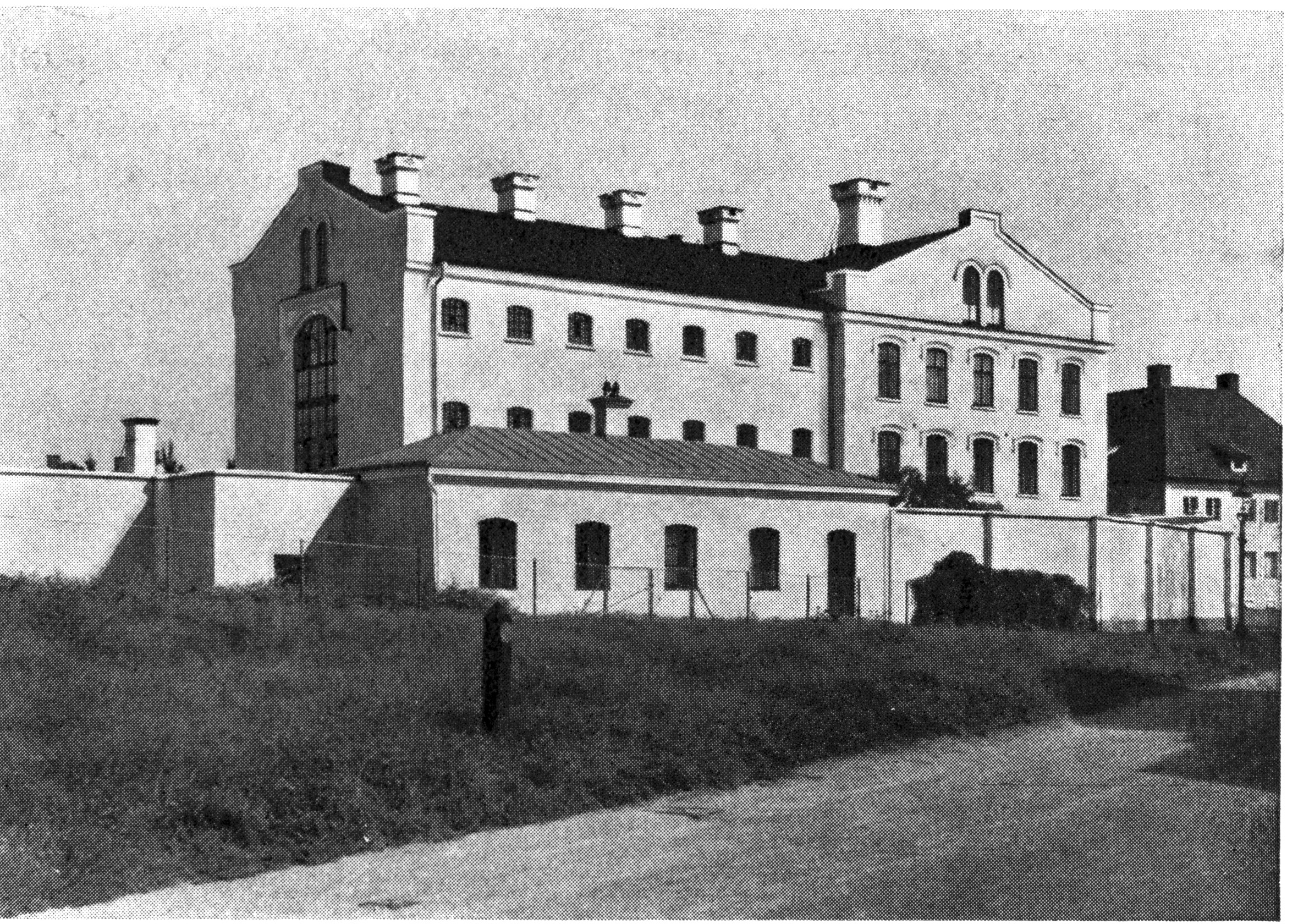 Länsfängelset i Nyköping